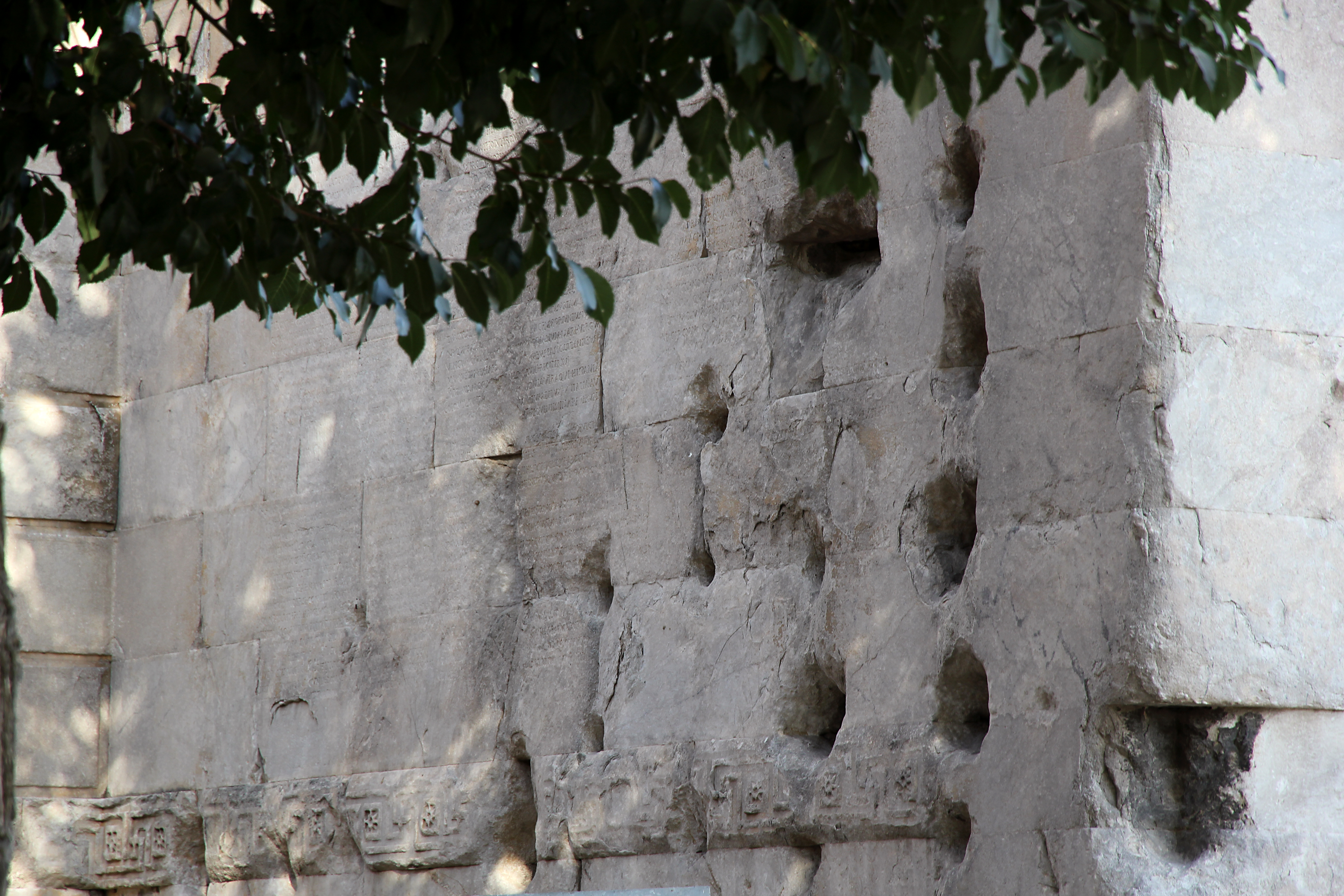 Tempel der Roma und des Augustus, Ankara, Türkei, innere Wand der Vorhalle mit lateinischer Version der Res gestae divi Augusti